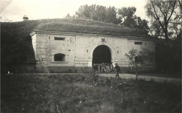 Брэсцкая крэпасць. Усходняя брама. Заблакаваны палякамі праезд